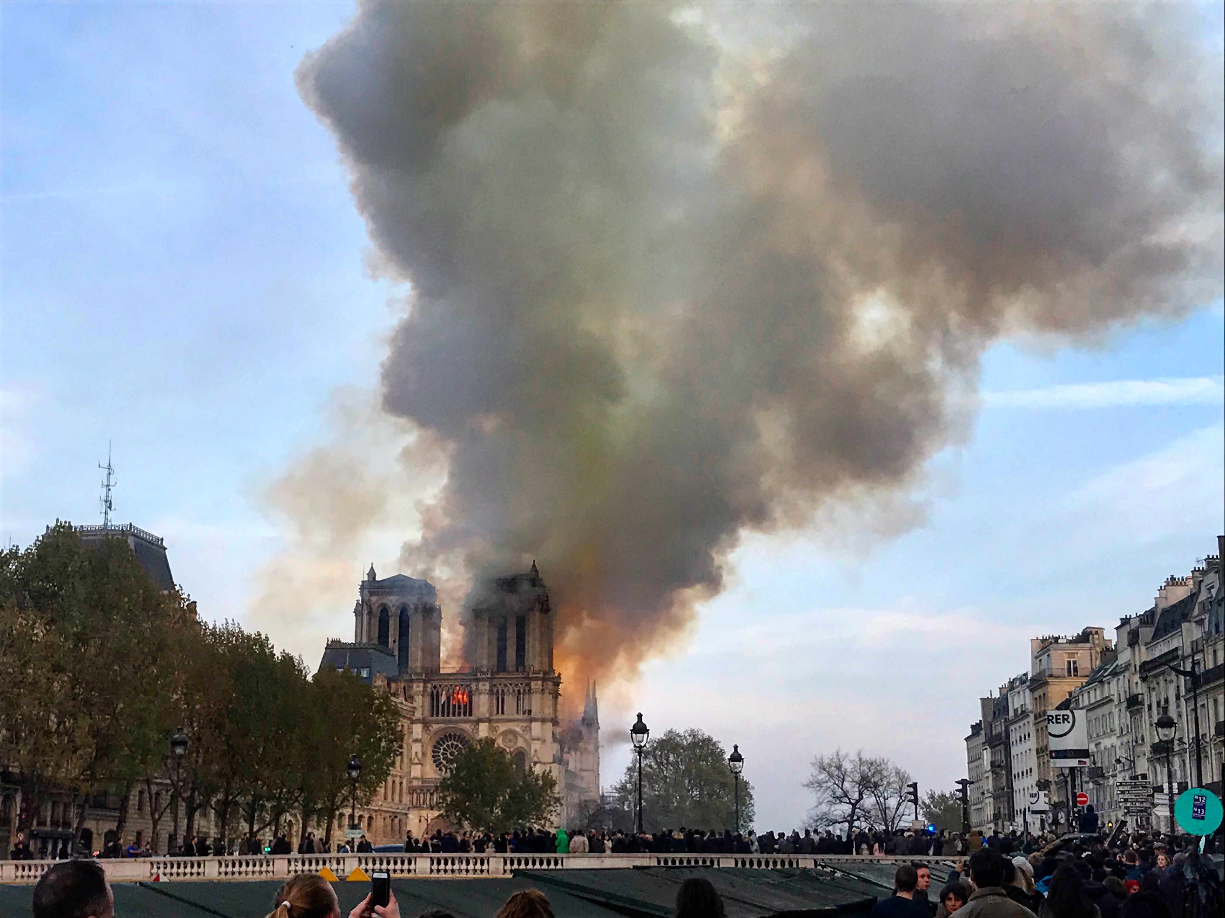 Incendi a la Catedral de Notre-Dame, París, el 15 d' abril de 2019